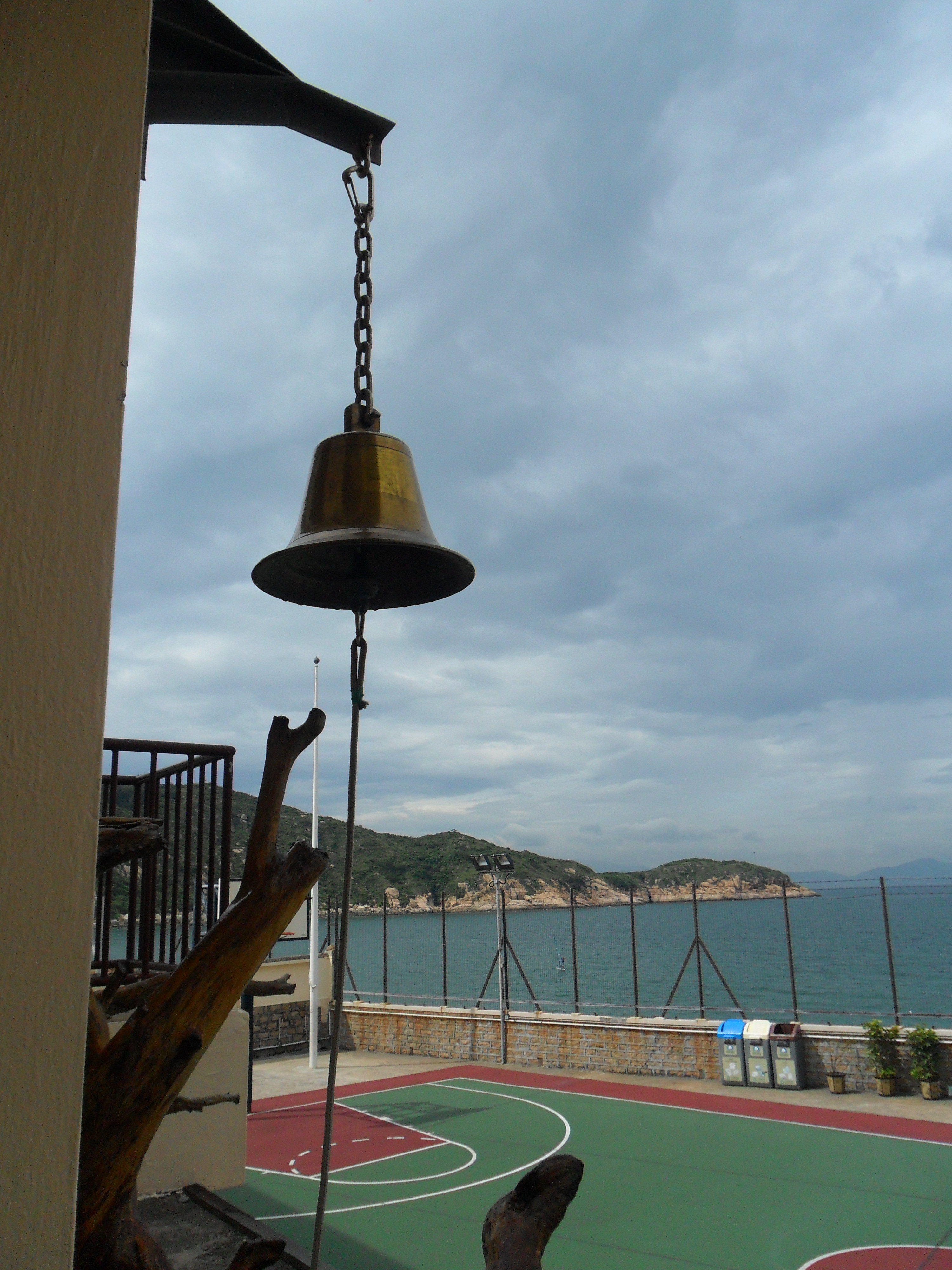 中文（香港）: 長洲花地瑪聖母堂, 香港, 中國